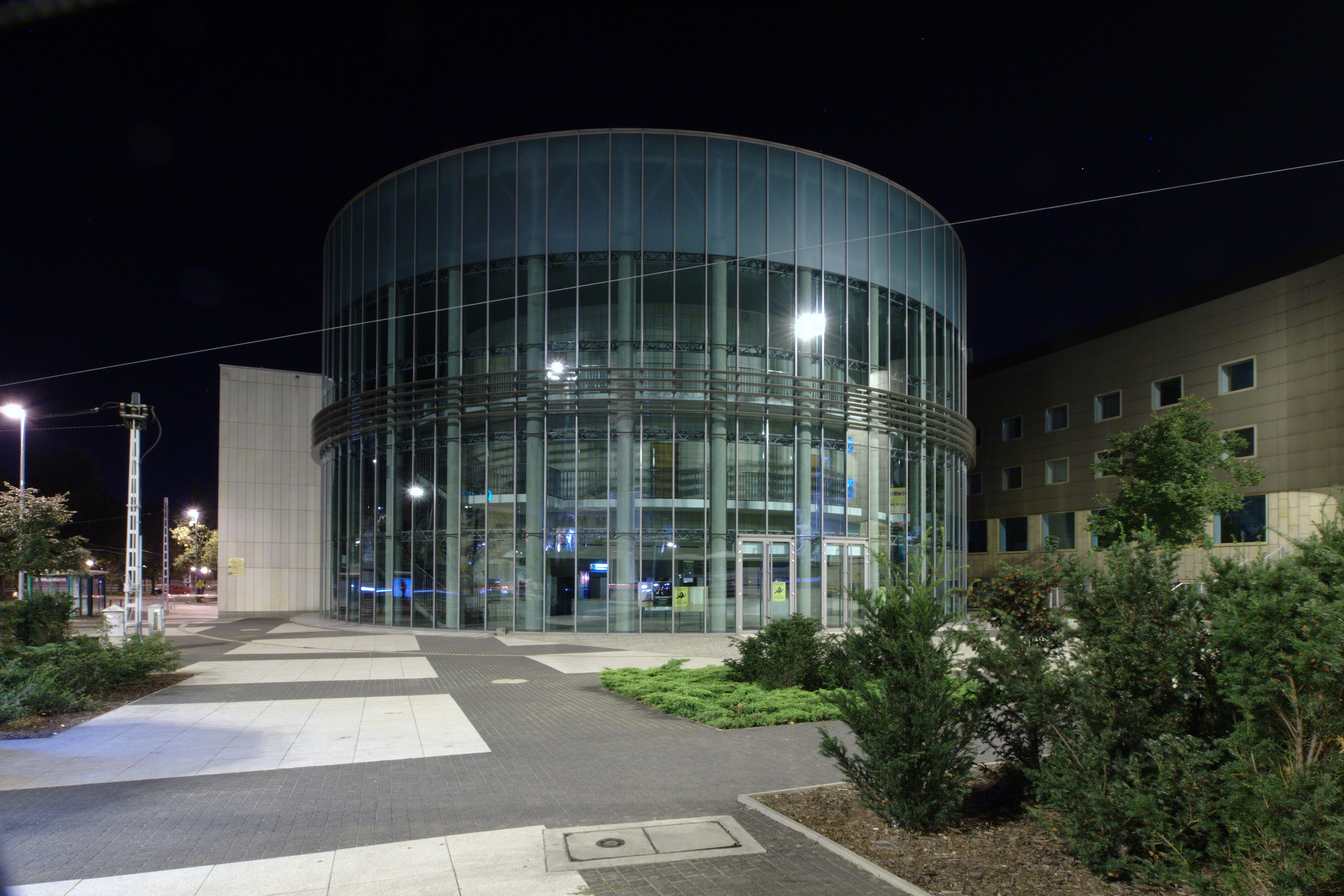 Aula Nova Akademii Muzycznej im. Ignacego Jana Paderewskiego.